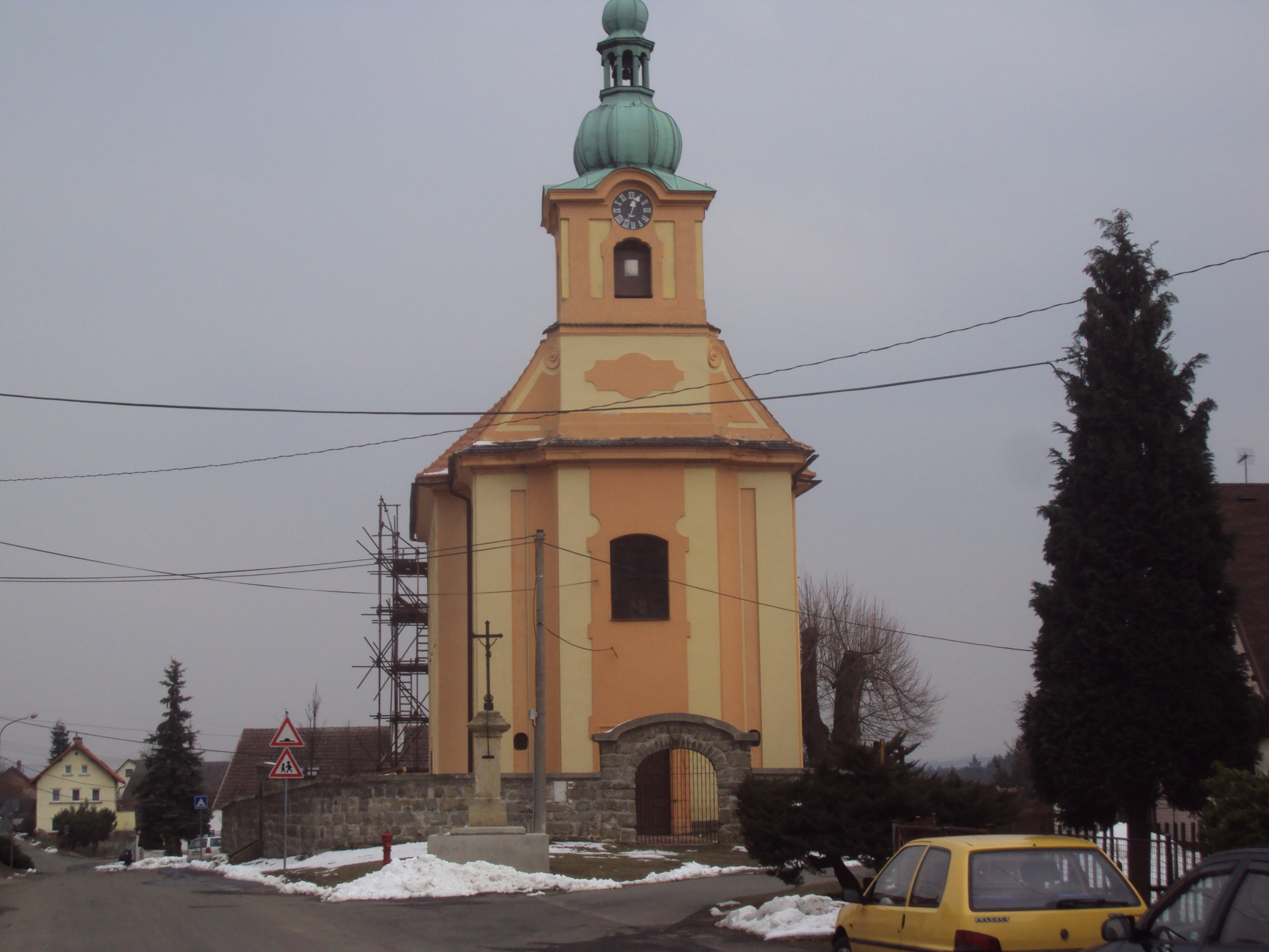 Kostel v Kvítkově